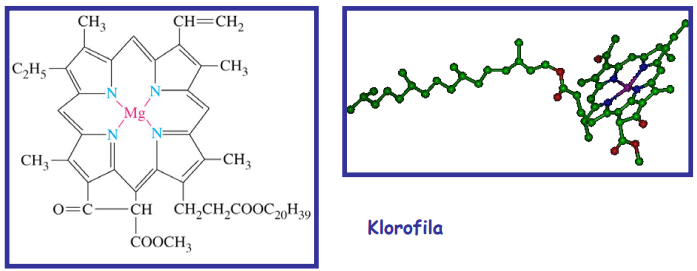 Klorofilaren egitura